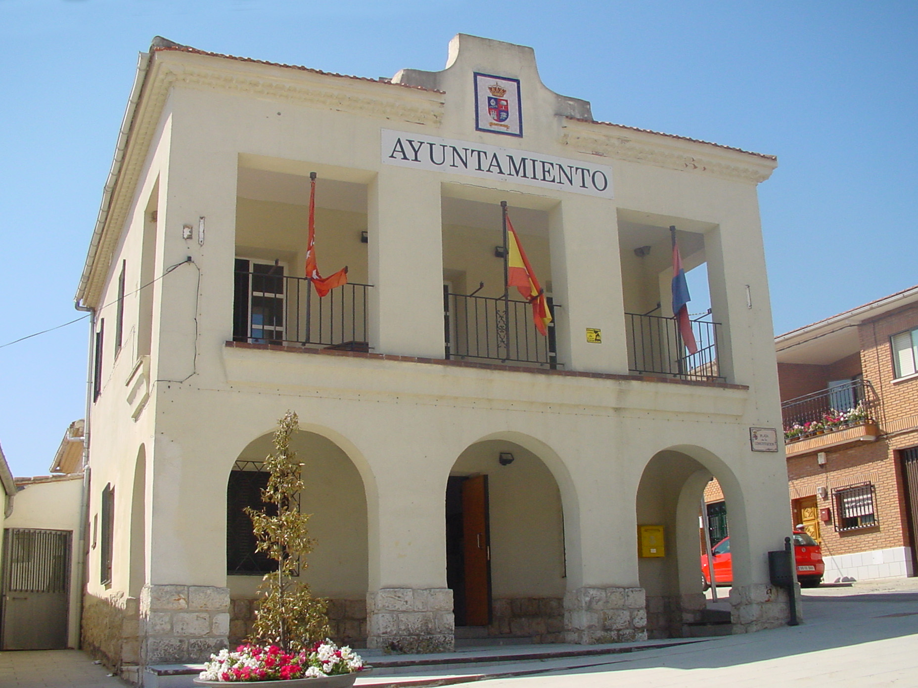 Ayuntamiento de Santorcaz.